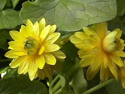 Ranunculus ficaria 'Flore Pleno'